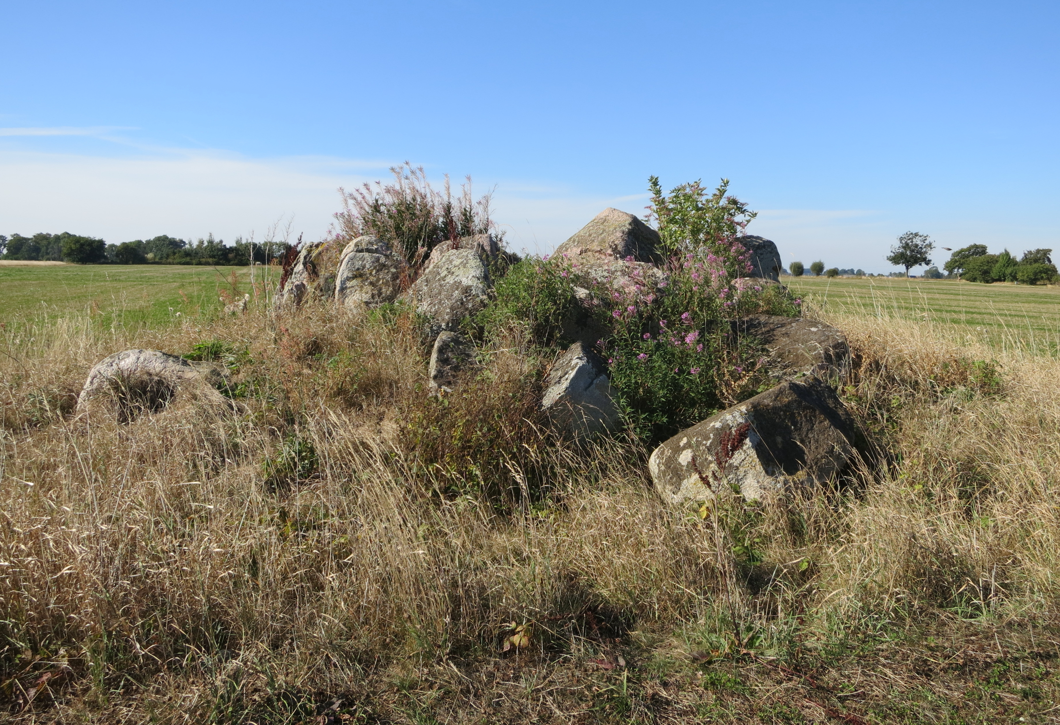 Hillhög, stenkammargrav i Borrby socken, Simrishamns kommun